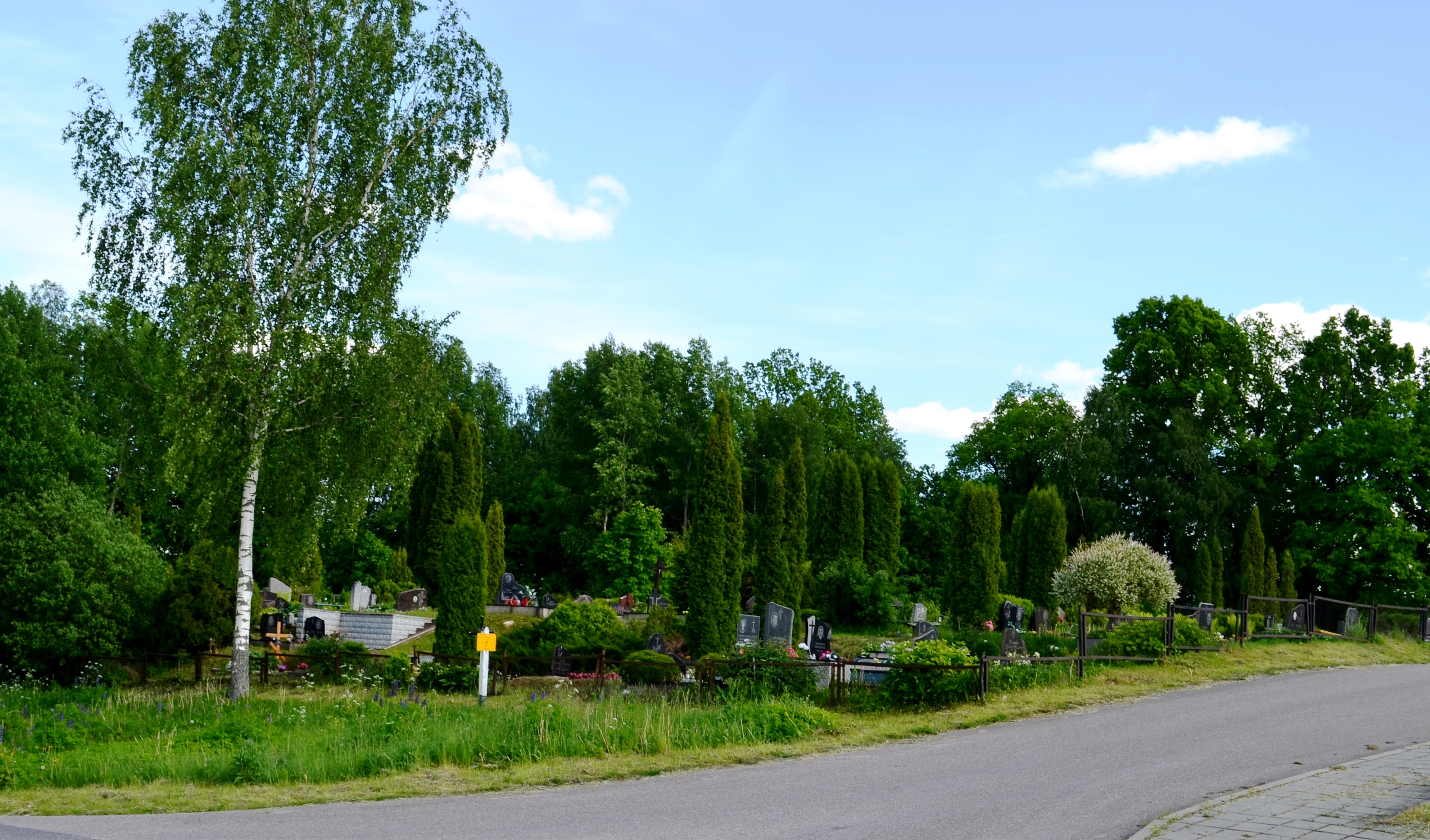 Dėdeliškių kapinės, Trakų raj.